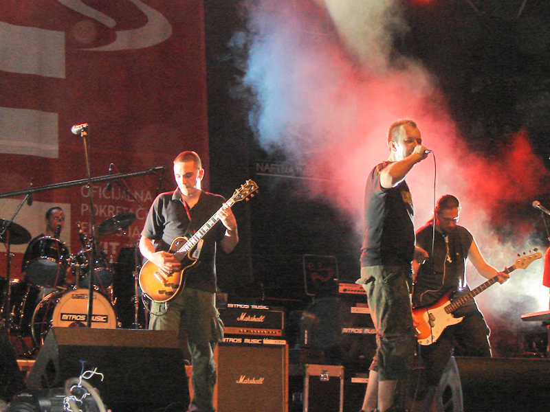 Dza ili Bu - EXIT07